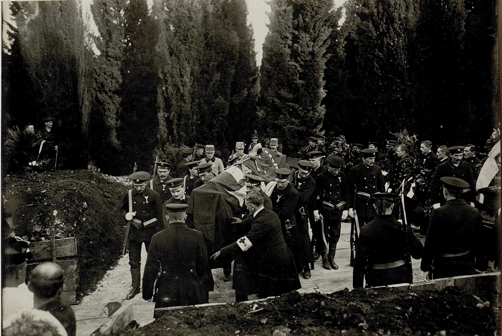 Grossadmiral Haus verstarb auf seinem Flaggschiff Viribus Unitis am 8.2.1917